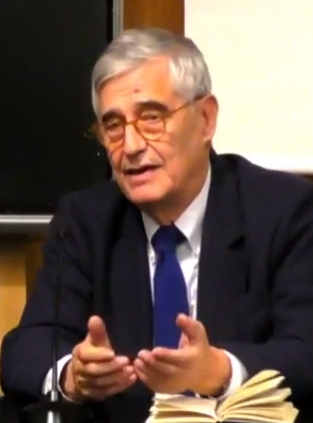 Arquitectura e Engenharia Eduardo Souto de Moura y Juan Miguel Hernández de León